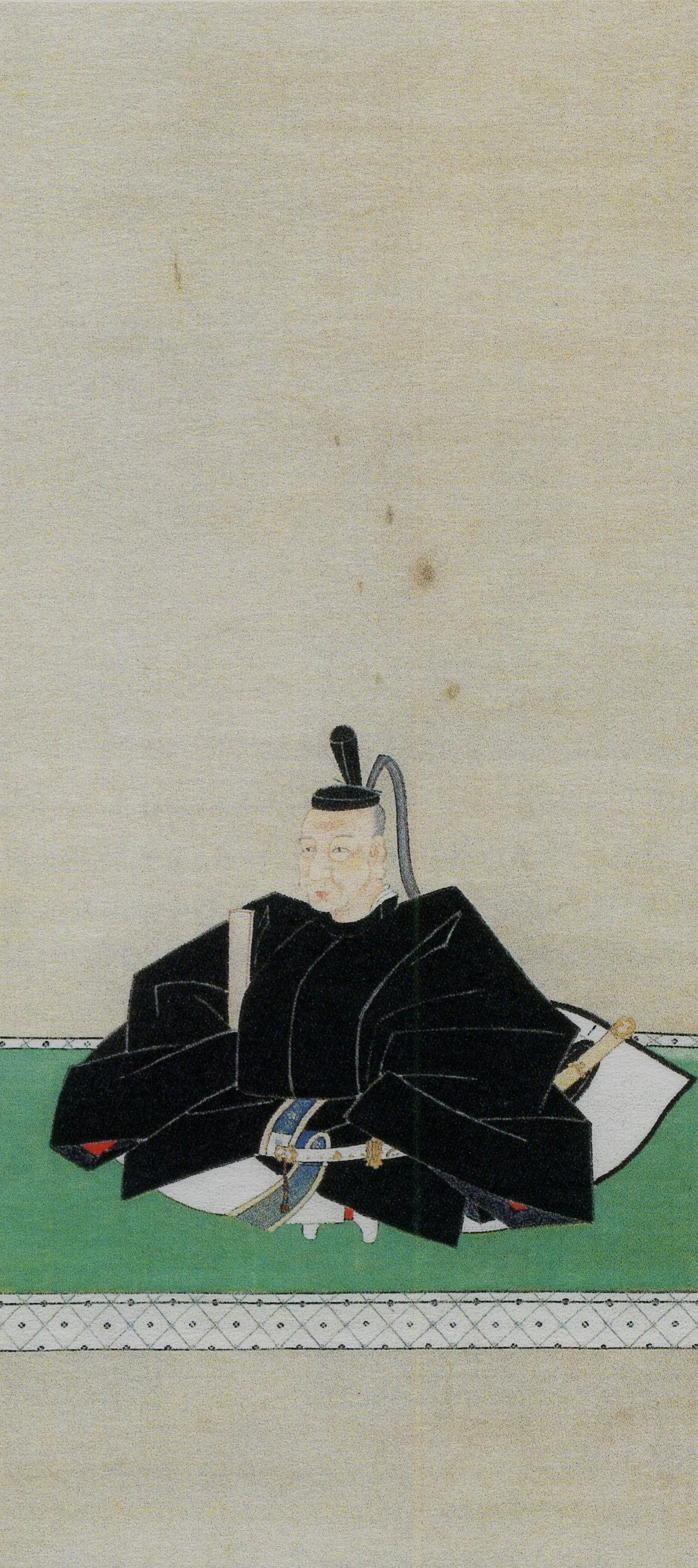 小笠原忠基の肖像。